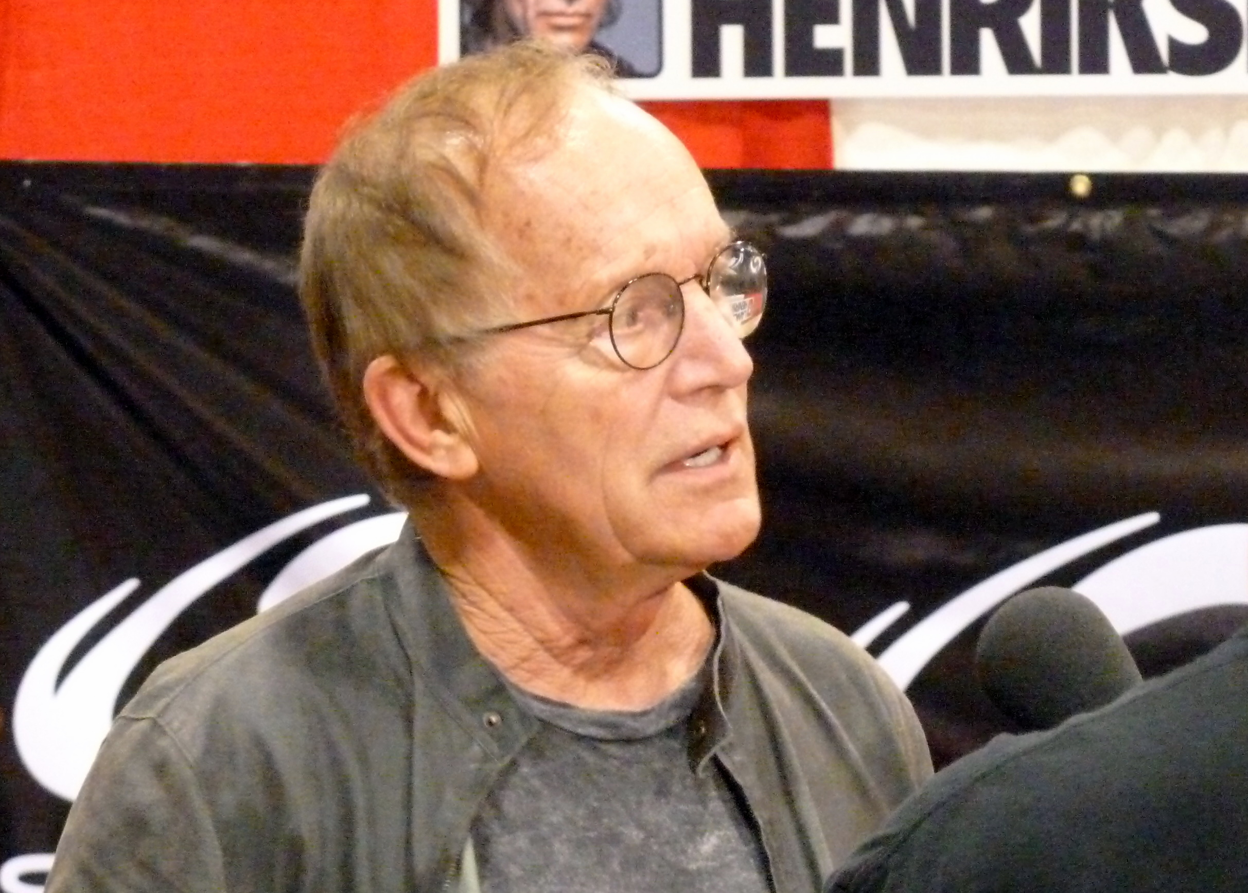 Lance Henriksen at Fan Expo 2011 in Toronto